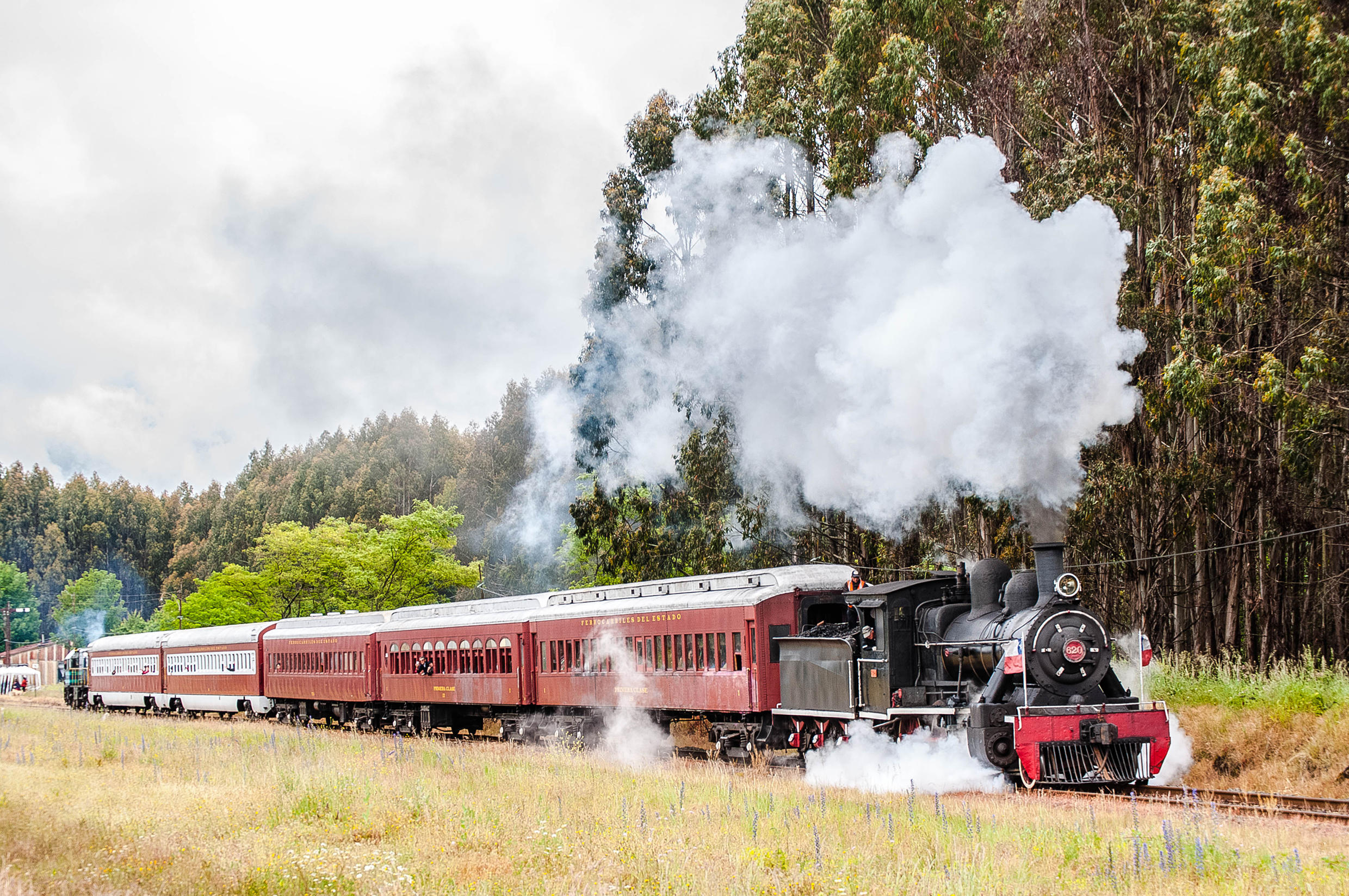 Luego de una detención de varios minutos, en que los comensales del tren degustaron todo tipo de exquisiteces de la zona, lentamente, la 620 comienza a rodar, bajo los grises y amenazantes cielos del sur, en el que los Queltehues, nos anunciaban la llegada del aguacero con su típico canto. Peor el viaje debía continuar, y dicen que si no te mojas, no sabes lo que es estar en el sur del país. Estación Rapaco. PK.901 RED SUR FFCC.